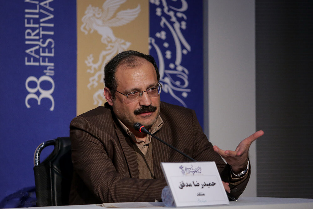 حمیدرضا مدقق در نشست خبری فیلم دوزیست در ۳۸مین جشنواره فیلم فجر